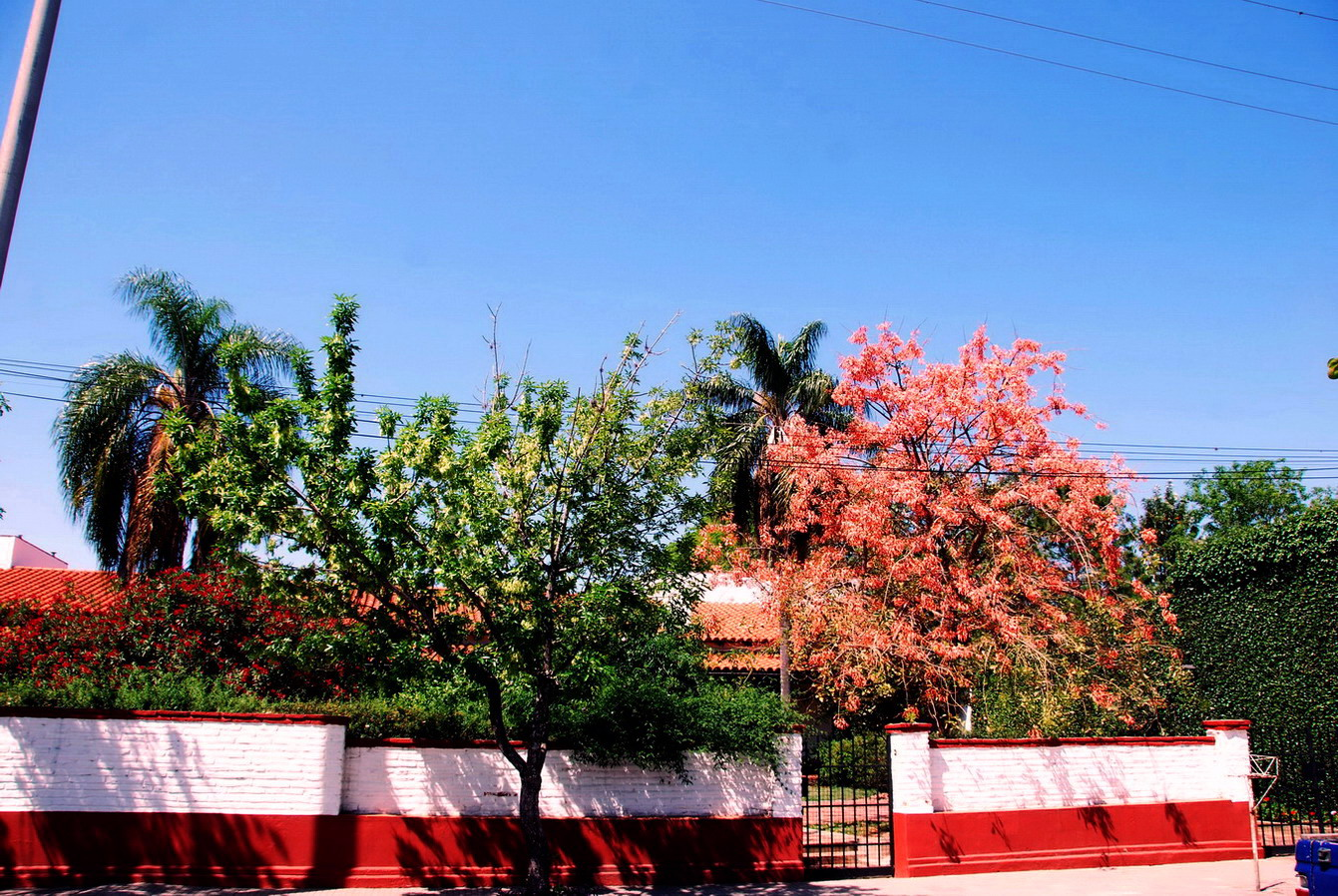 El color rosado salmón de las flores de Erythrina dominguezii contrasta con el canopeo verdoso de otras especies. Goya, provincia de Corrientes, Argentina.